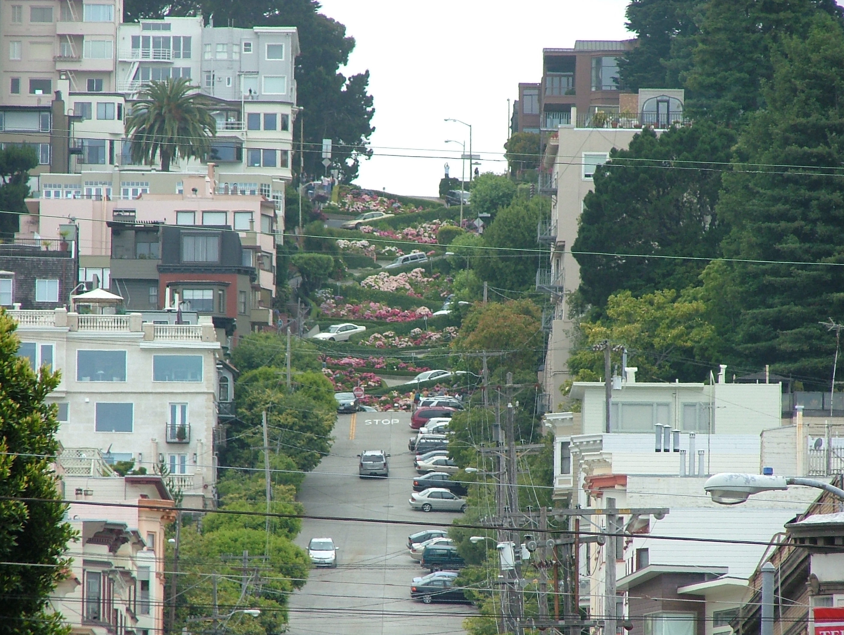 Lombard Street San Francisco. Crooked part.